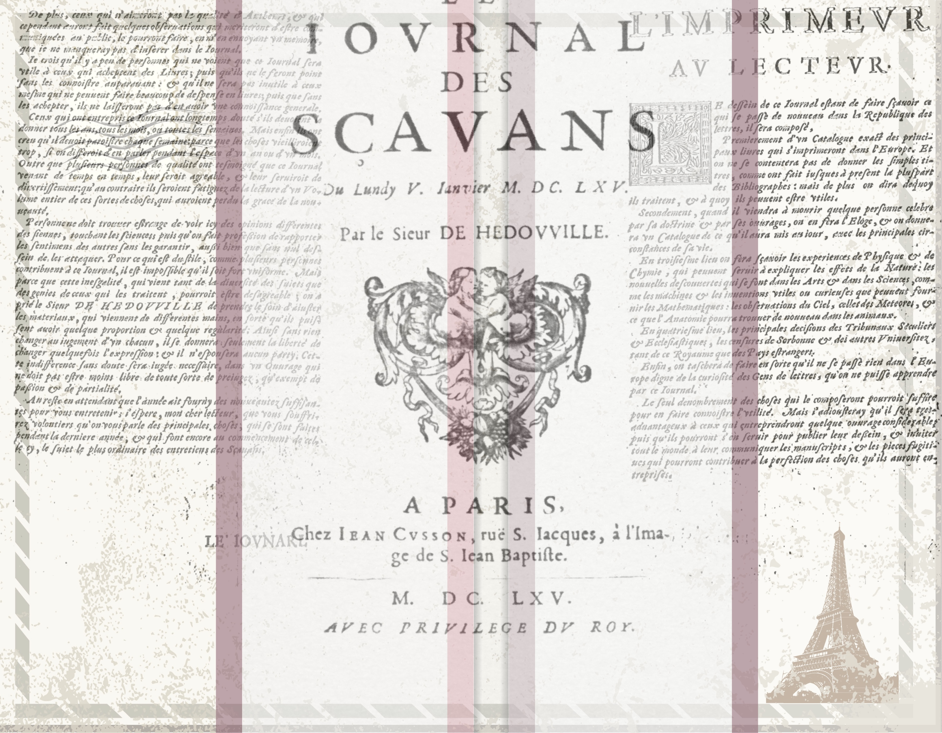 Montage comprenant la page couverture et les deux premières pages suivantes